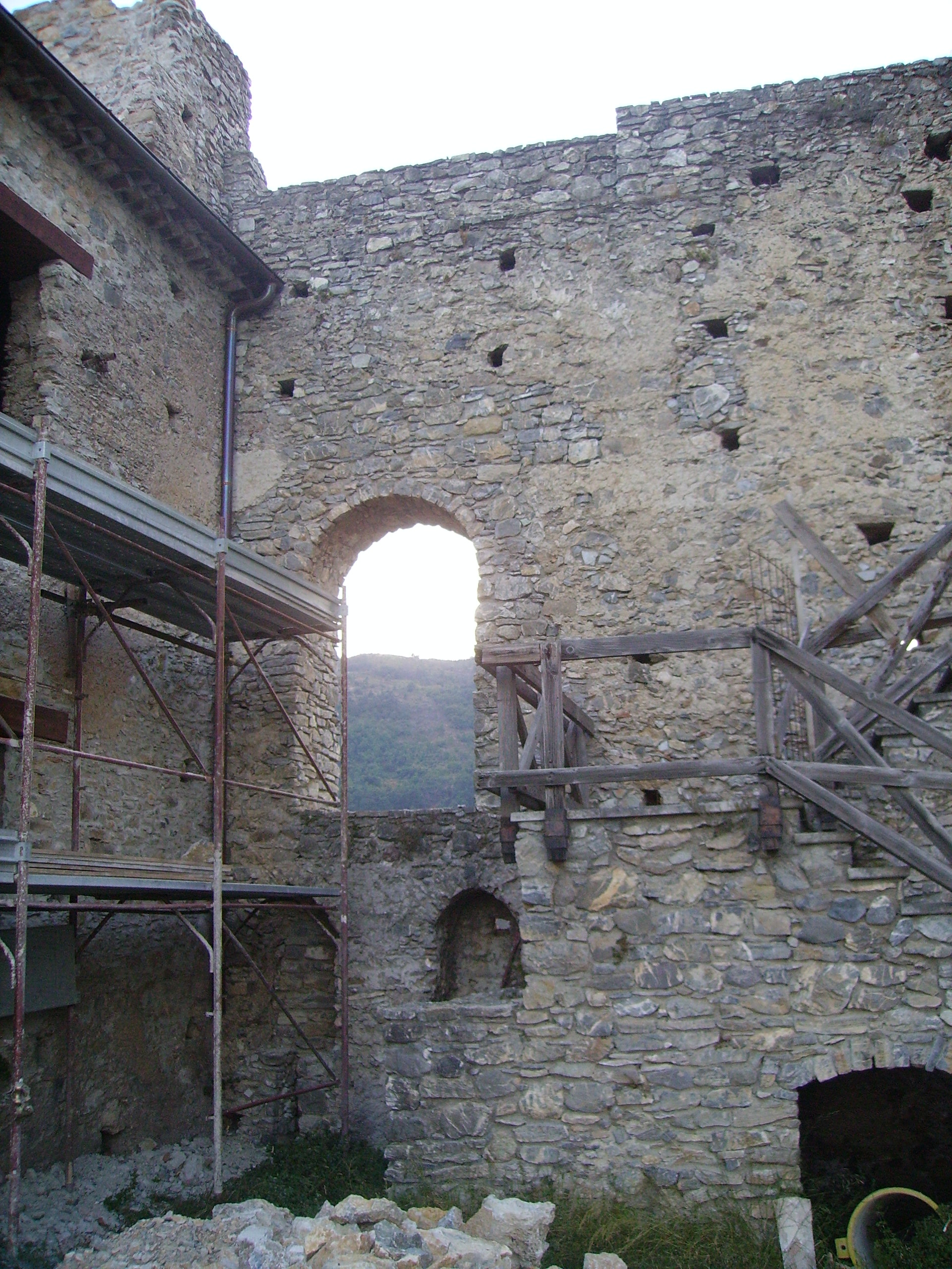 Castello di Malvito (CS) - interno